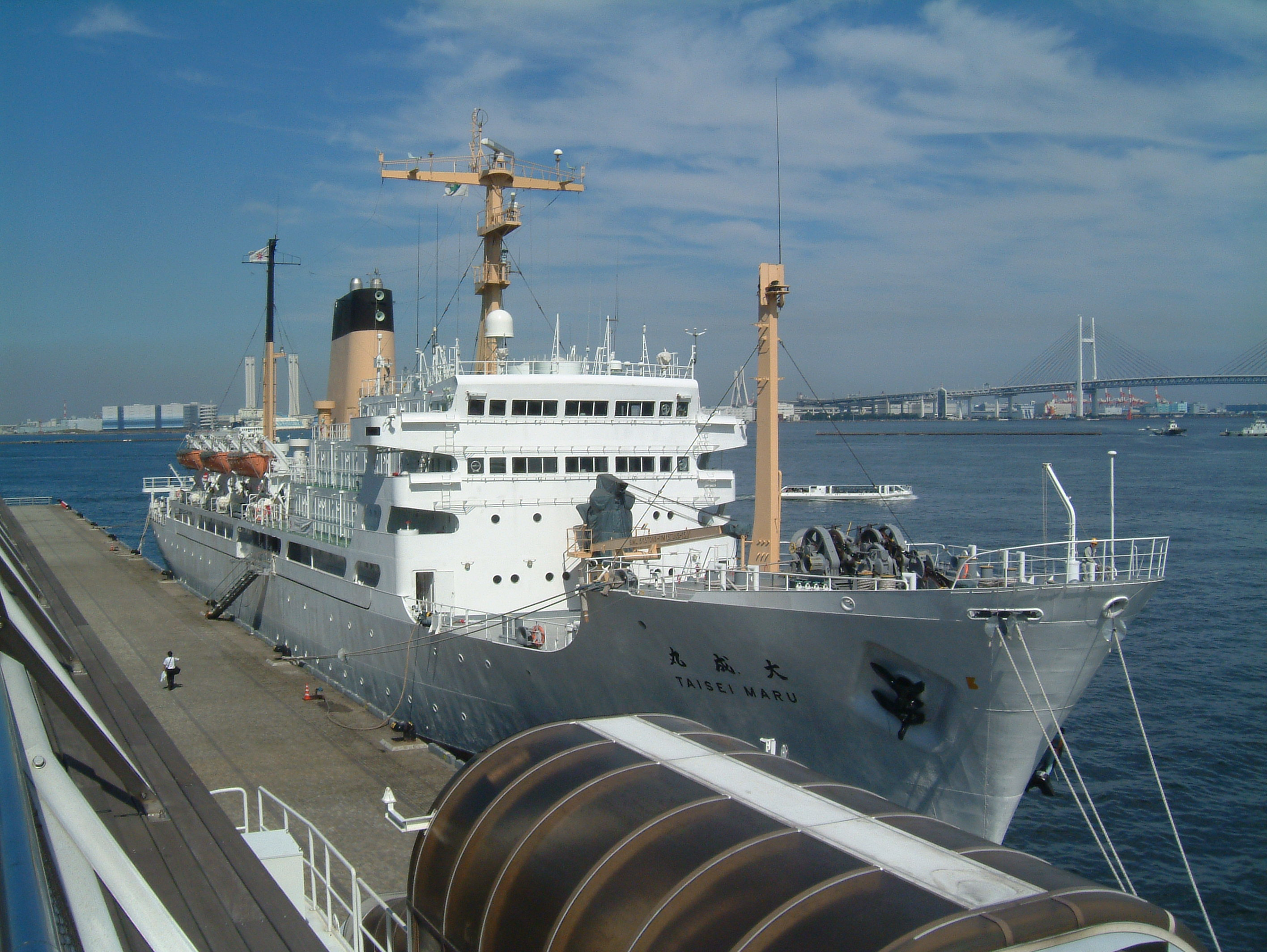 航海訓練所の練習船大成丸（たいせいまる）、横浜市中区の大さん橋国際客船ターミナルで撮影